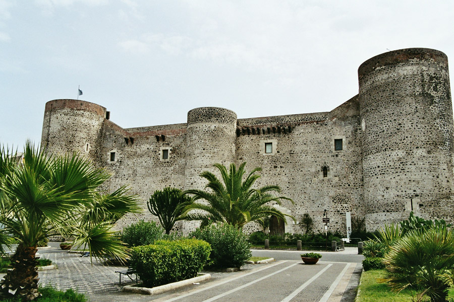 Das Kastell Ursino wurde als Stauferburg im Auftrag Kaiser Friedrich II. zwischen 1239 und 1250 von Riccardo da Lentini auf den Grundmauern einer normannischen Befestigungsanlage des Hafens von Catania errichtet. Die Ähnlichkeit im Grundriss des Kastells in Catania mit den übrigen friderizianischen Festungen Siziliens wie dem Kastell Maniace in Syrakus und dem Kastell in Augusta ist offensichtlich.